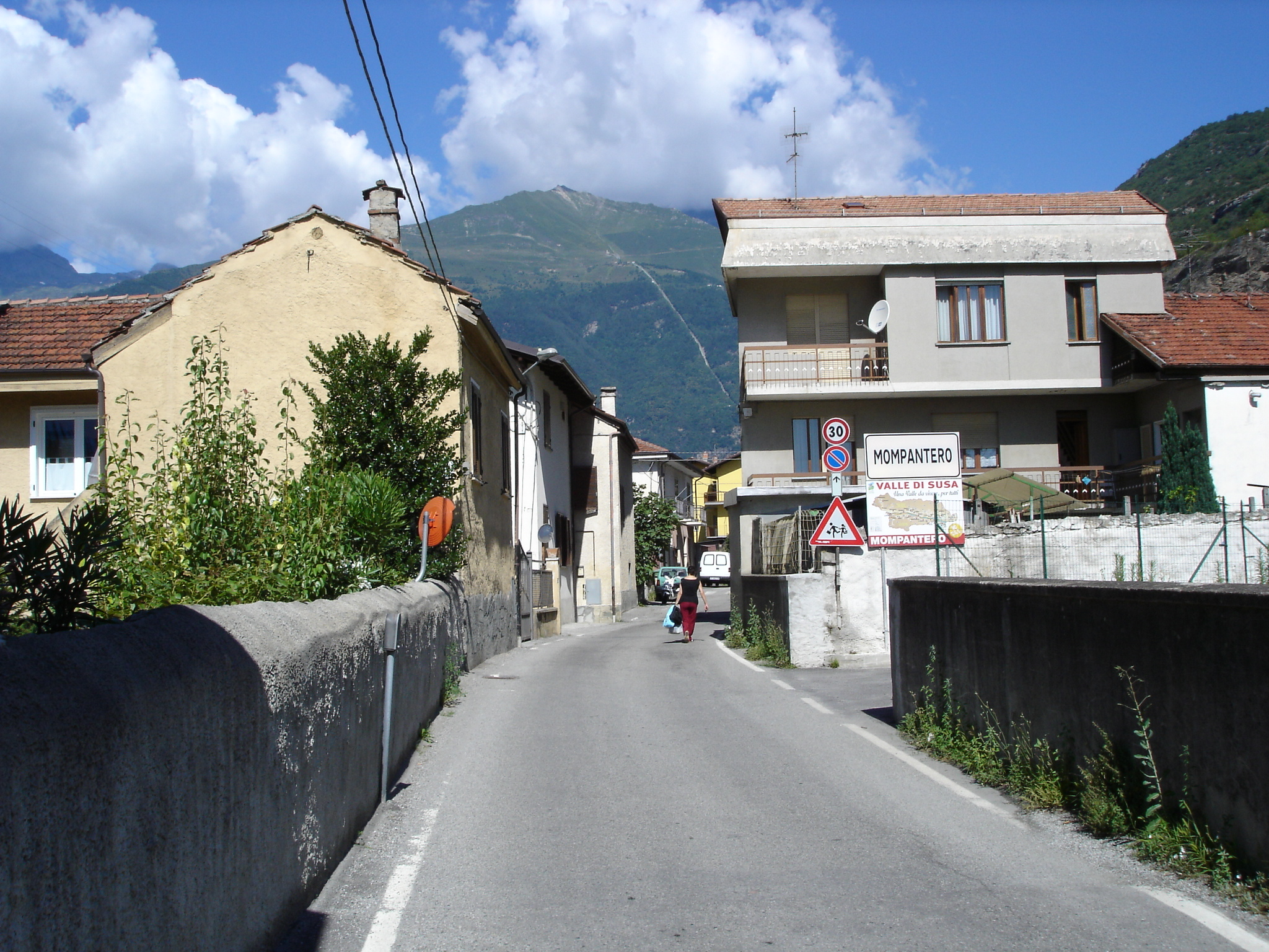 Mompantero, Piemonte